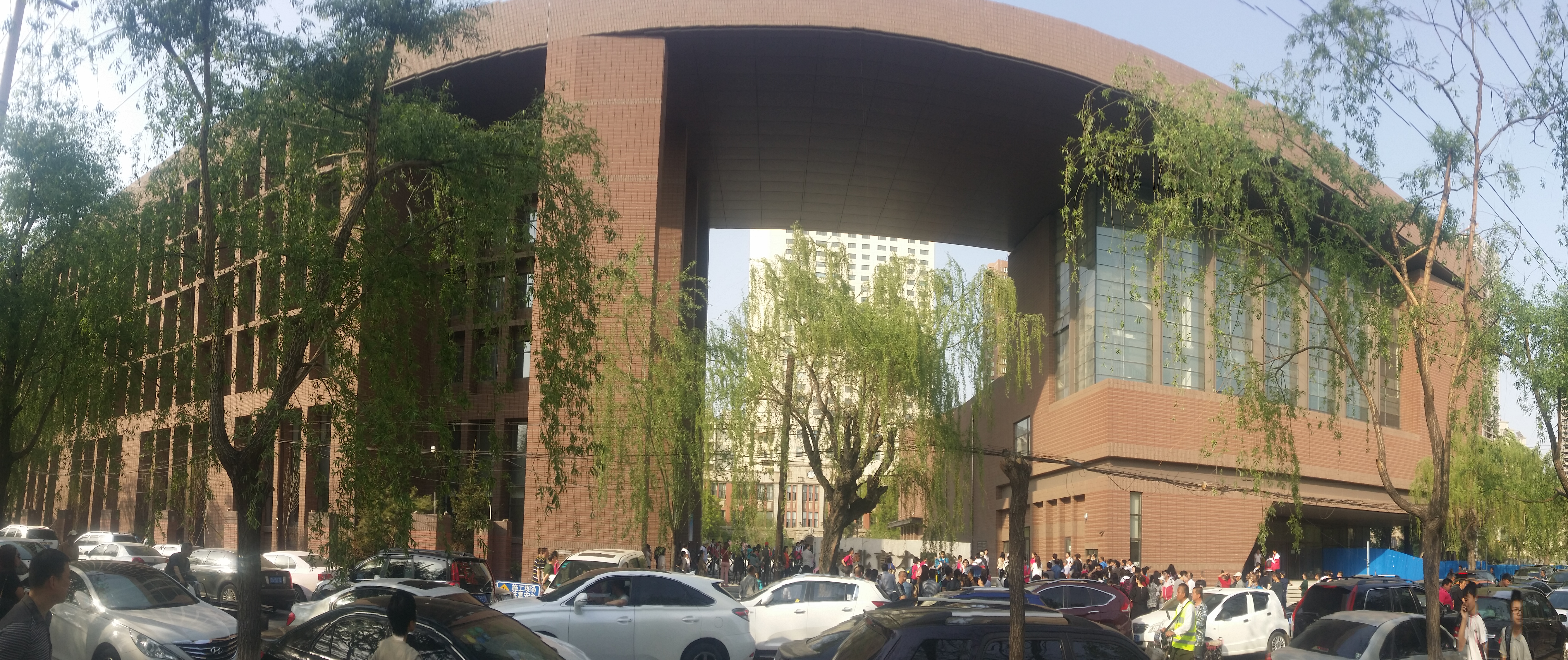 中文（中国大陆）: 东北育才学校初中部综合楼